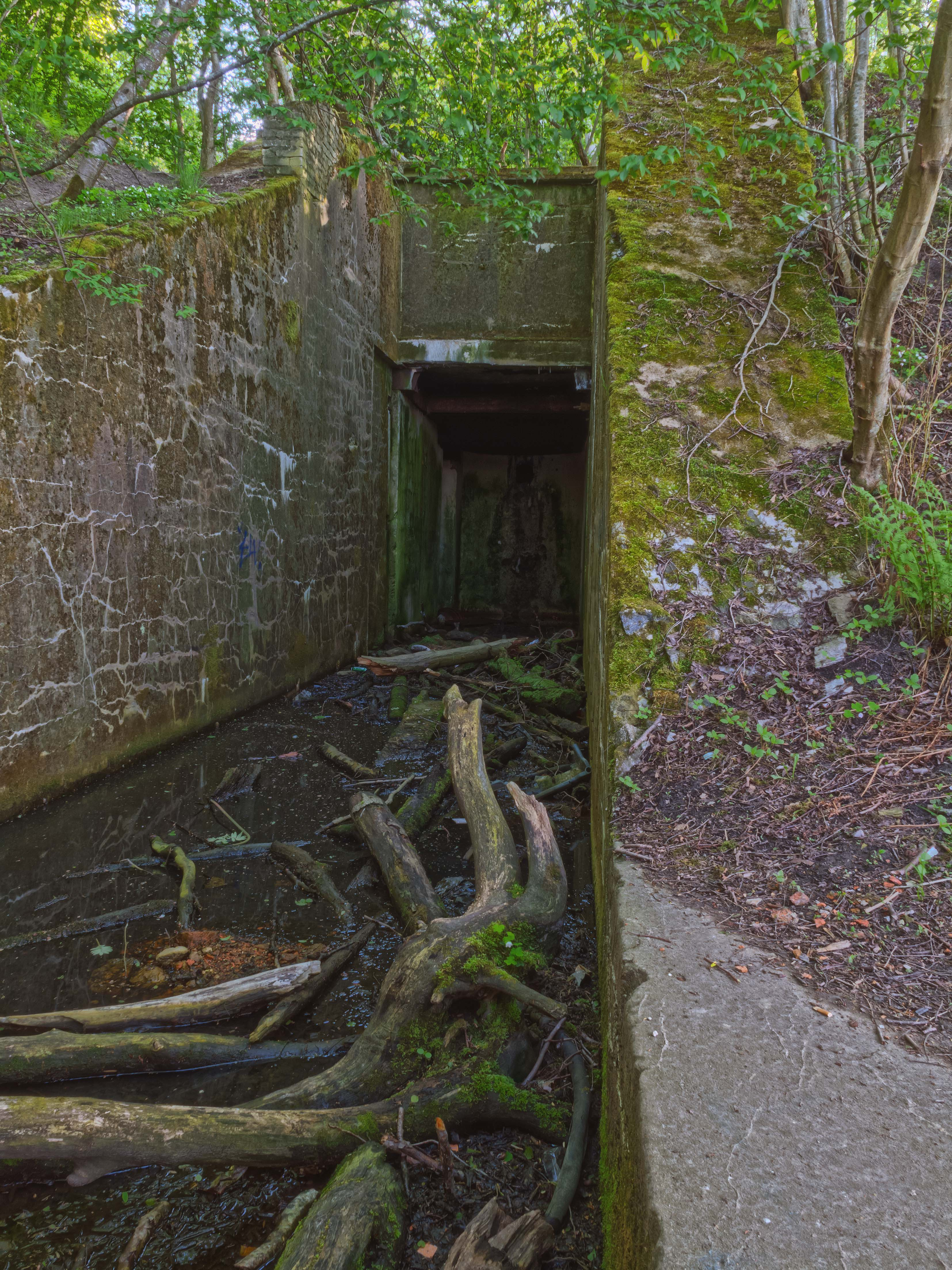 Peeter Suure Merekindluse rannakaitsepatarei nr. 4 helgiheitja varjendi sissepääs.